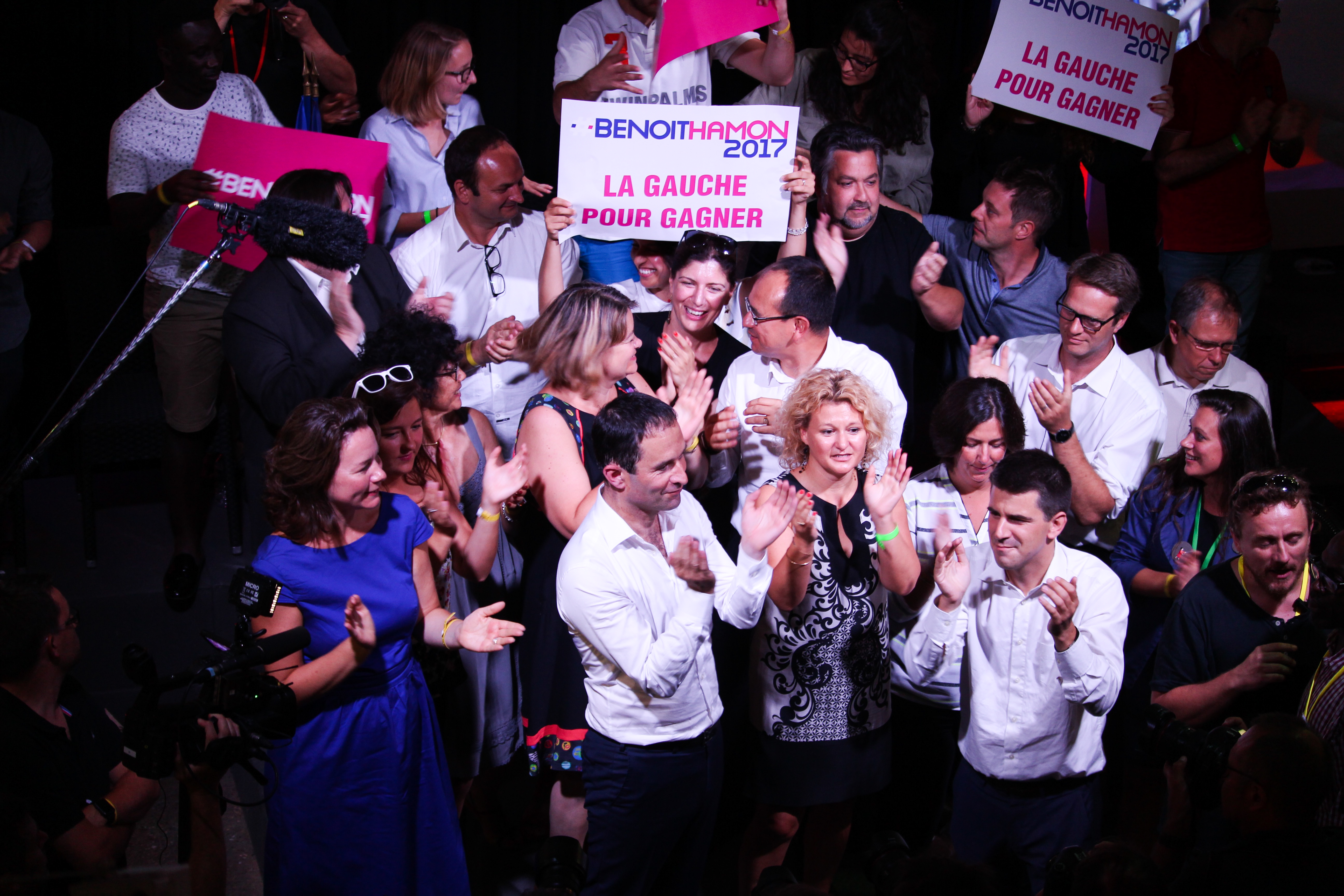 Benoît Hamon avec plusieurs élus et militants à la tribune à la fin de son meeting à Saint-Denis